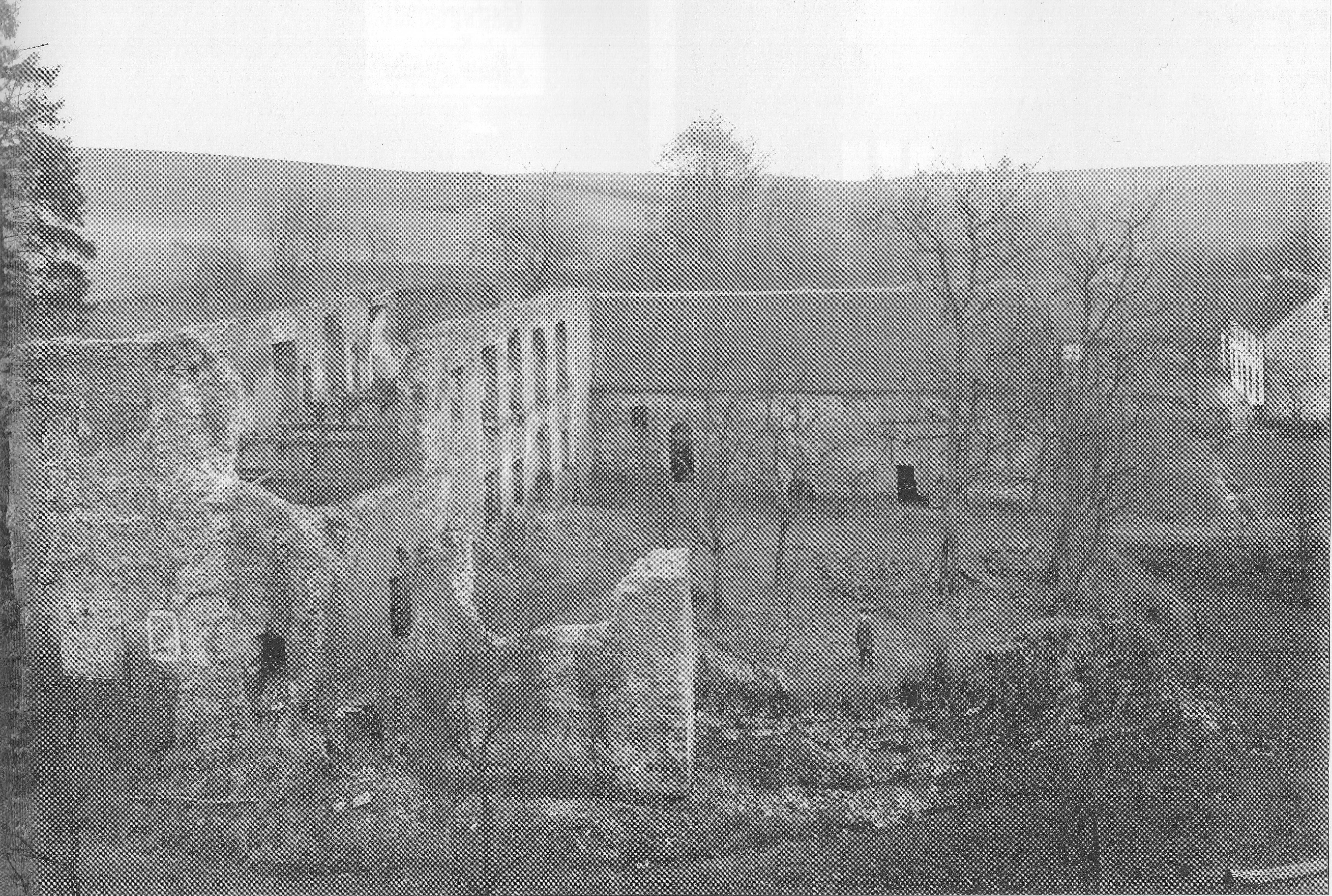 Burg Schönrath in Lohmar, Zustand der Hauptburg vor dem Ersten Weltkrieg, Blick aus nördlicher Richtung